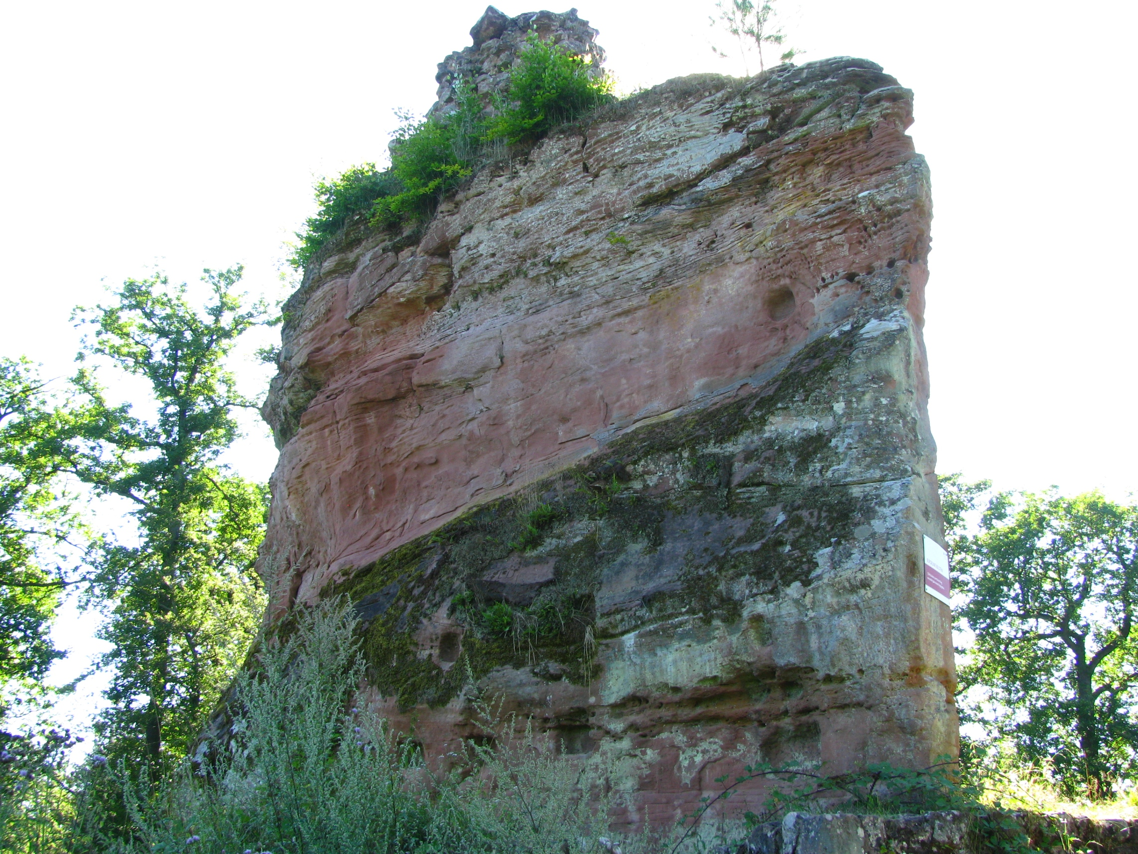 Ruine der Burg Beilstein während eines Ausfluges